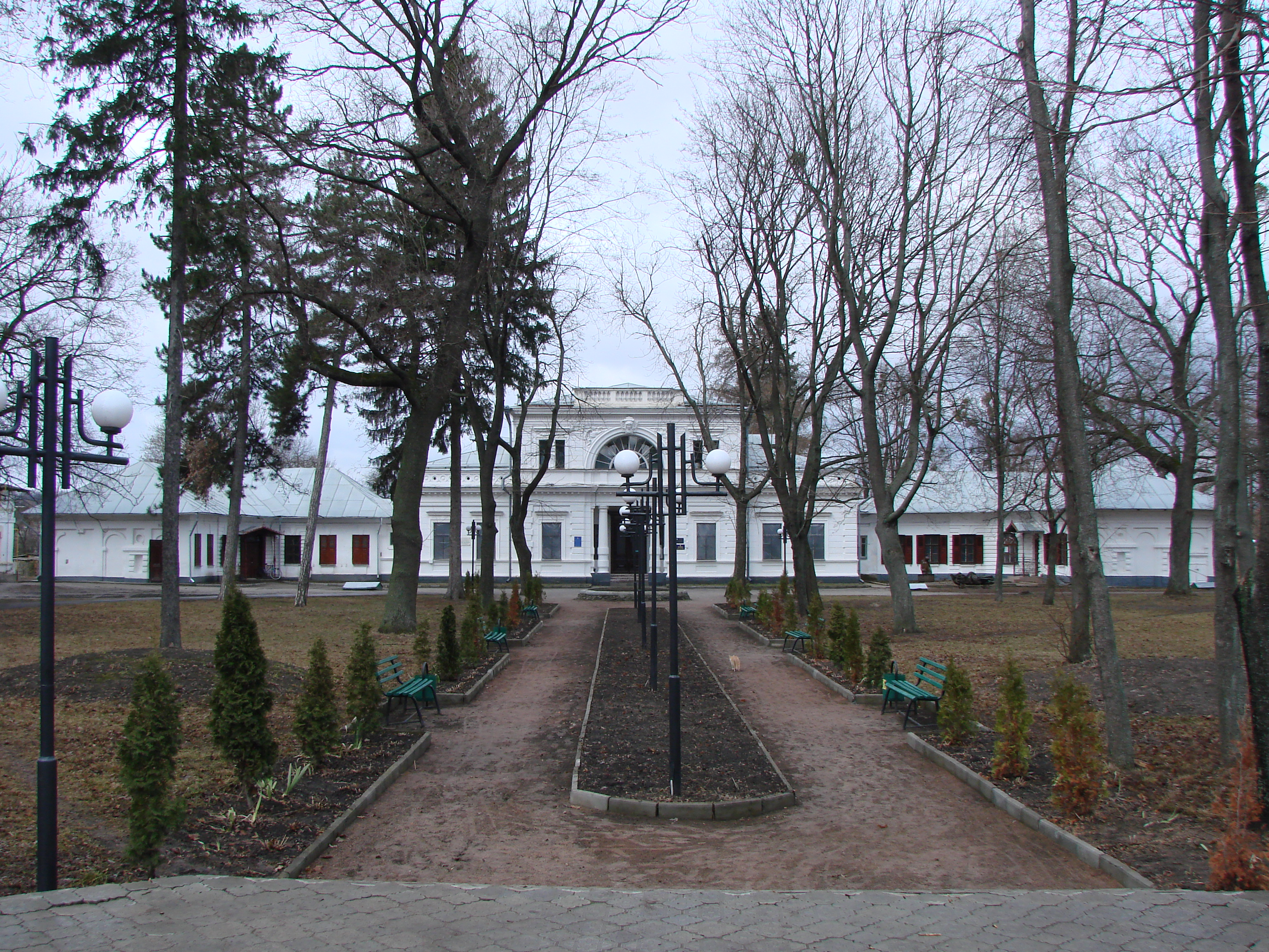 Будинок, в якому жив і працював Чайковський П. І. — російський композитор, Тростянець, вул. Миру, 16